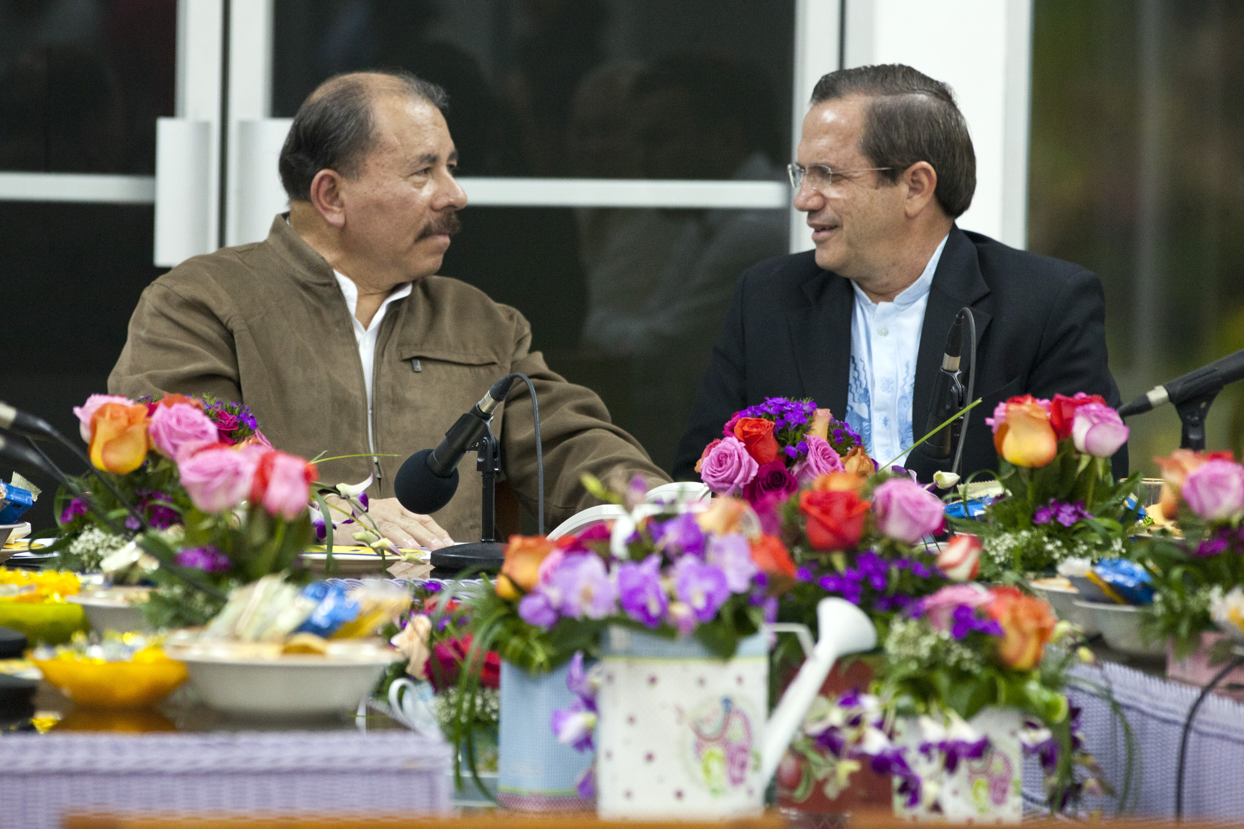 Managua (Nicaragua), 21 de agosto 2013. Daniel Ortega, Presidente de Nicaragua recibió a la delegación del Ecuador encabezada por el Canciller Ricardo Patiño. El Ministro del Interior, José Serrano, también estuvo presente. Foto: Fernanda LeMarie - Cancillería del Ecuador.